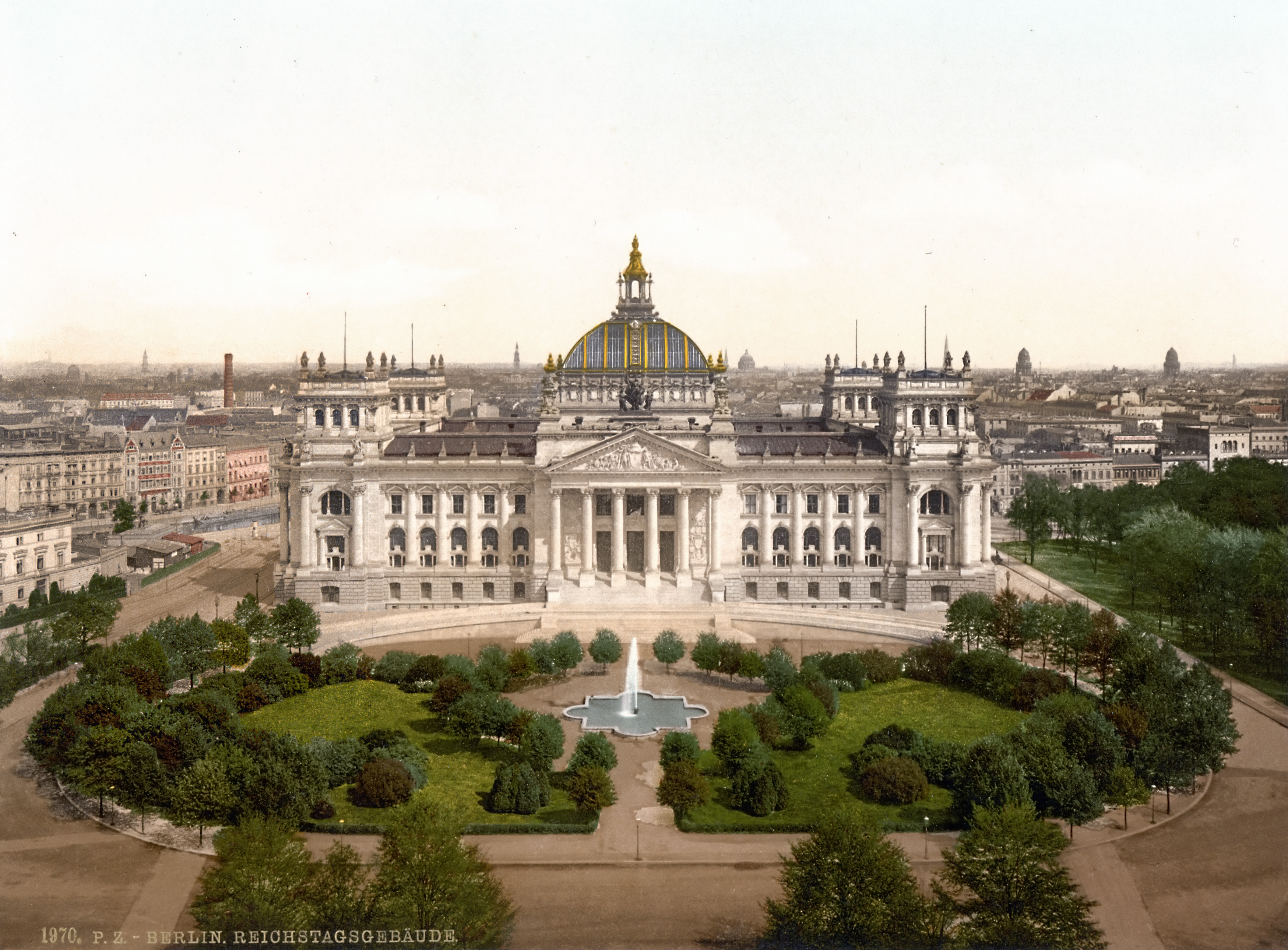 Reichstagsgebäude ca. 1894 bis ca. 1900/Detroit Publishing Co., catalogue J--foreign section. Detroit, Mich. : Detroit Photographic Company, 1905/Library of Congress Prints and Photographs Division Washington, D.C. 20540 USA Variante von Bild:Reichstagsgebaeude.jpg